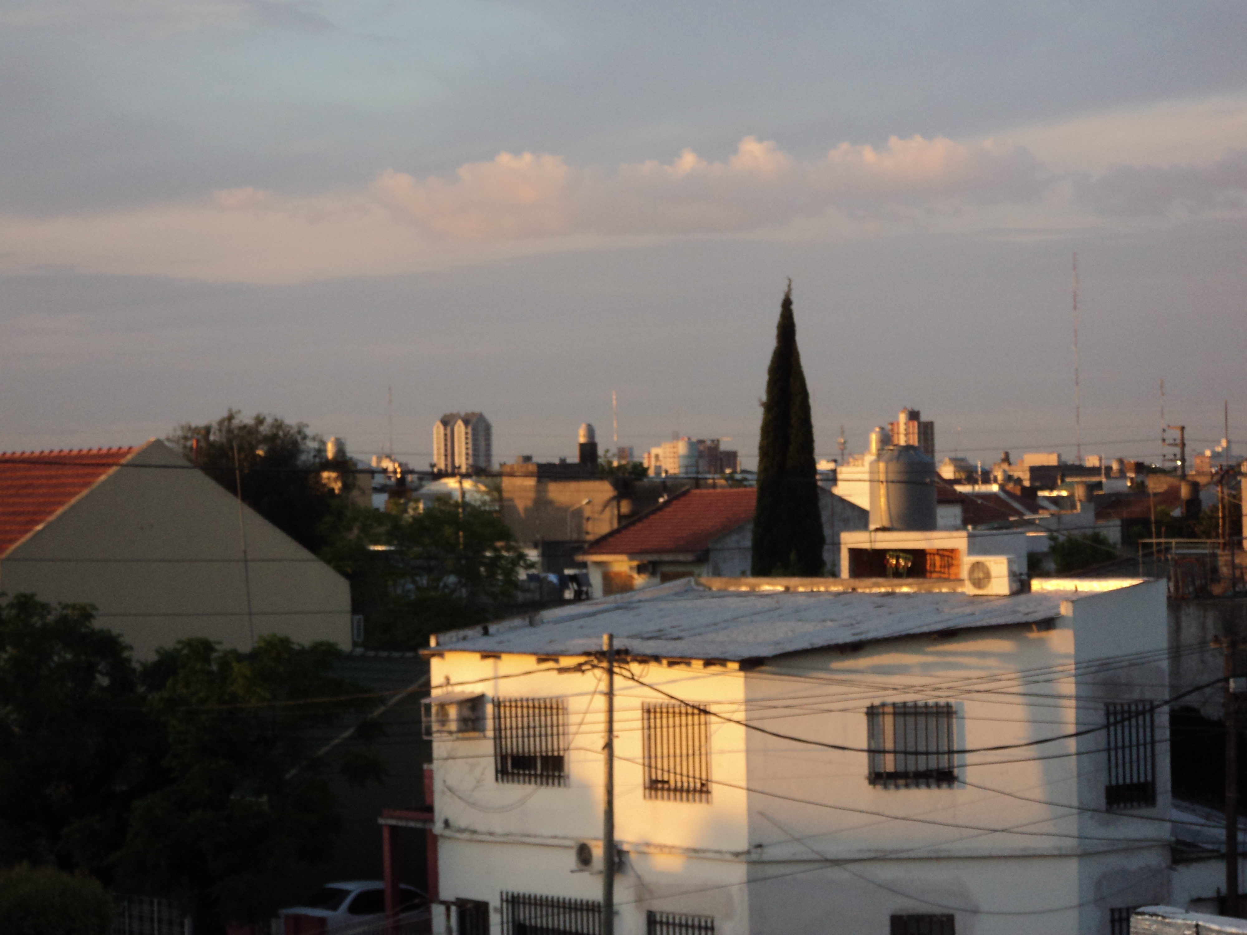 Vista panorámica de San Justo.